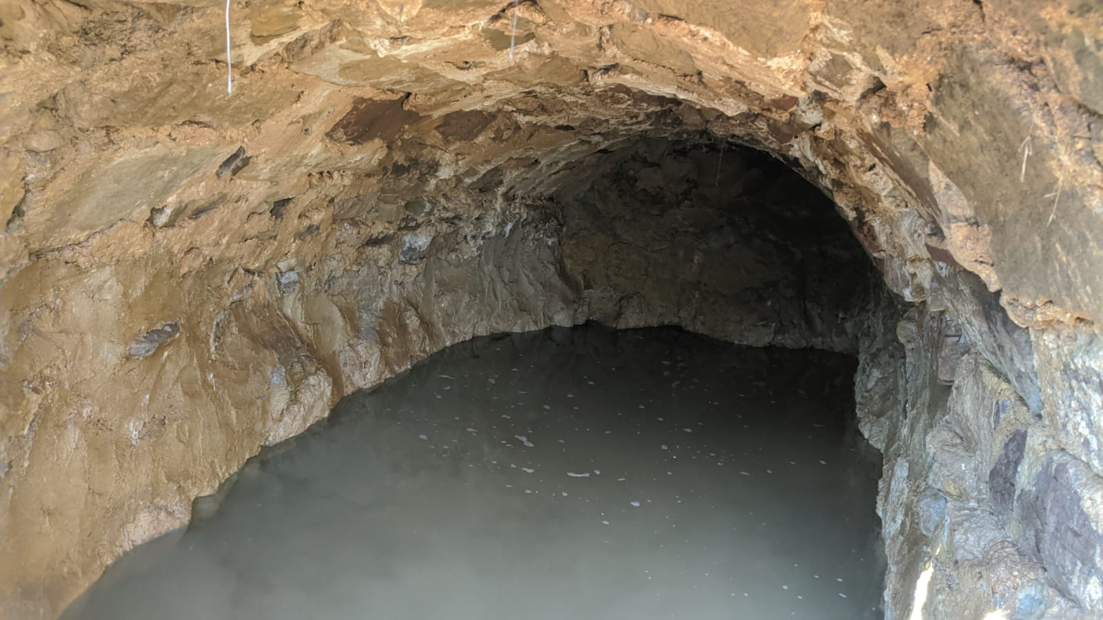 Galería abobedada